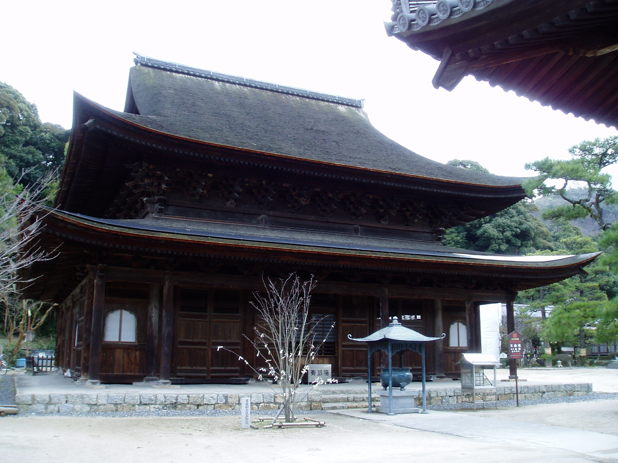 Fudoin Kondo (不動院金堂) in Higashi-ku, Hiroshima, Hiroshima, Japan.